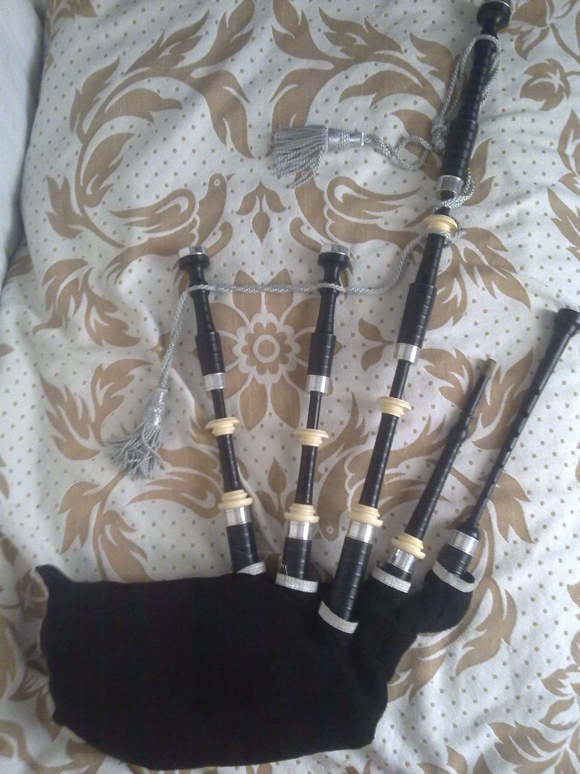 Autore: Saif Abu Sharar Descrizione: Cornamusa scozzese McCallum P2